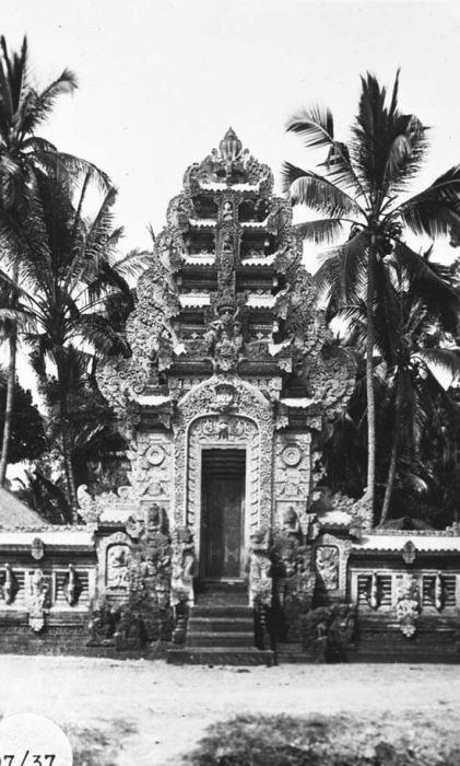 Foto. Tempel, Pura Kehen, bij Bangli, Bali